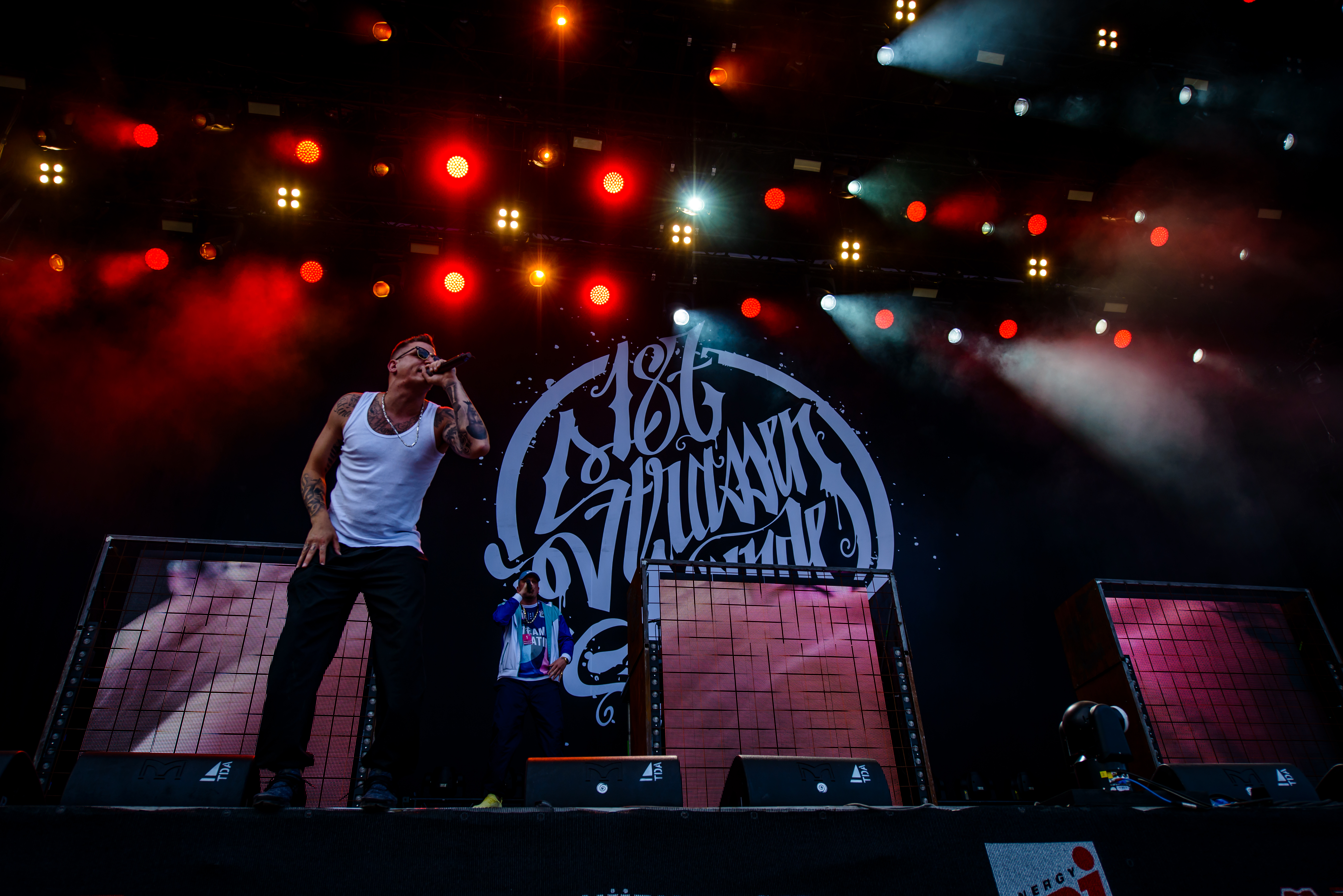 'Rock im Park 2017; Nürnberg': '187 Straßenbande'